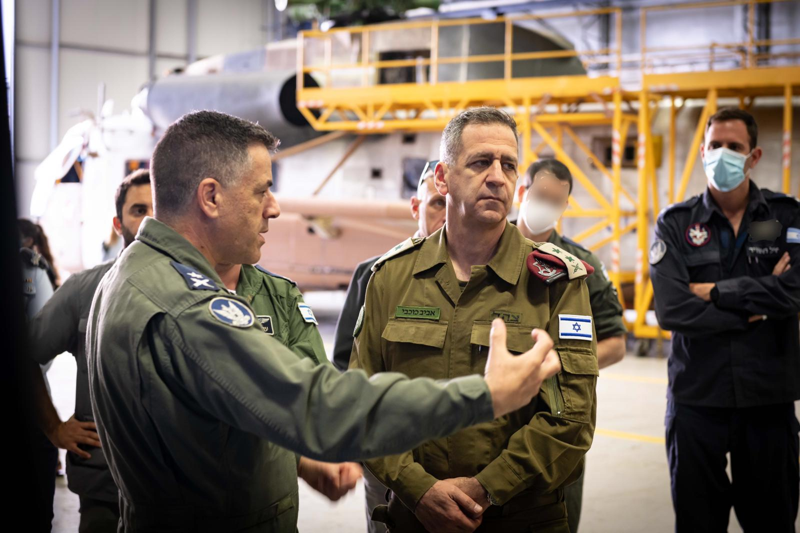 ביקור הרמטכ"ל ומפקד חיל האוויר בבסיס תל נוף.